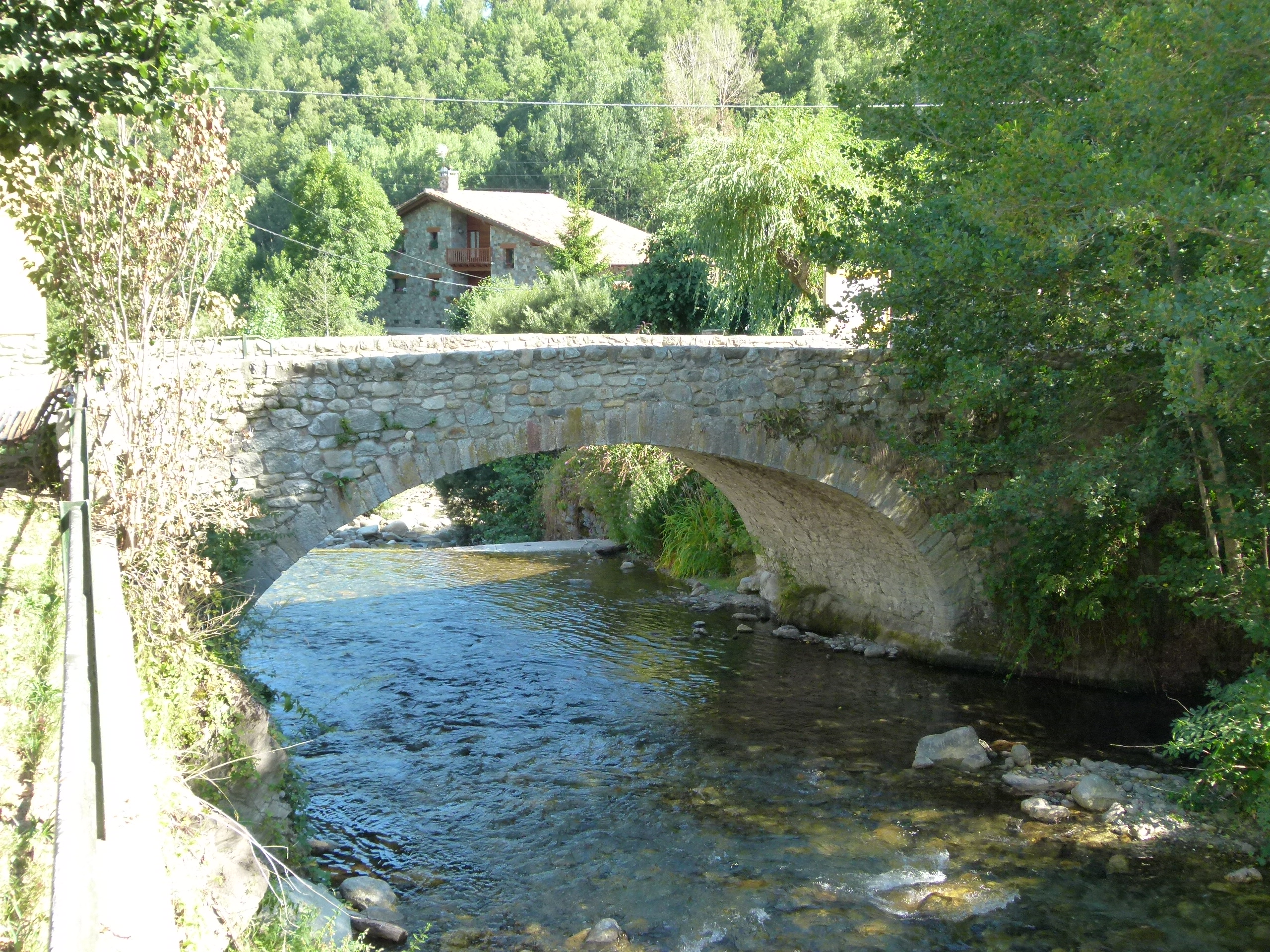 Pont d'Espinauga (Llanars)